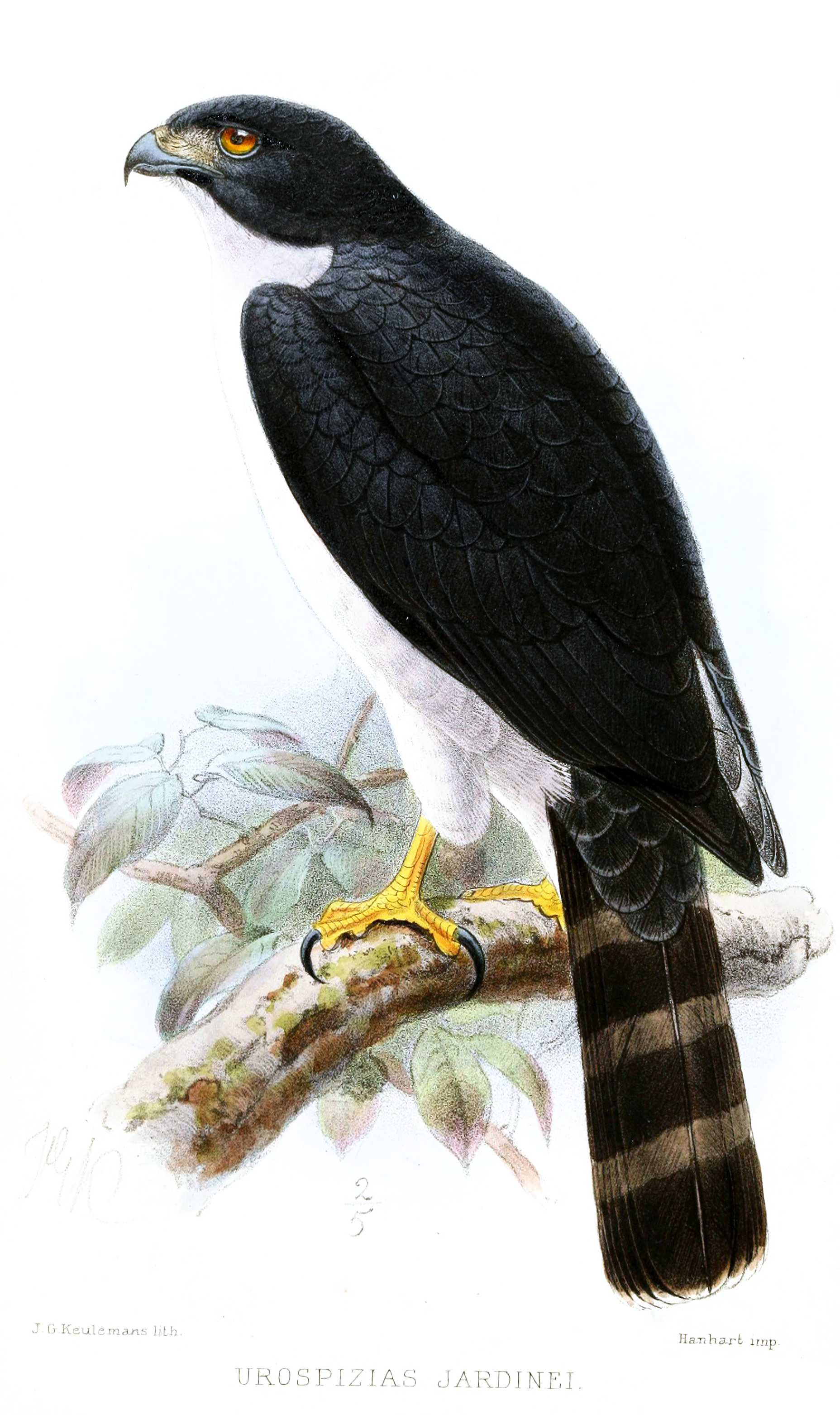 Urospizias jardinei = Accipiter poliogaster